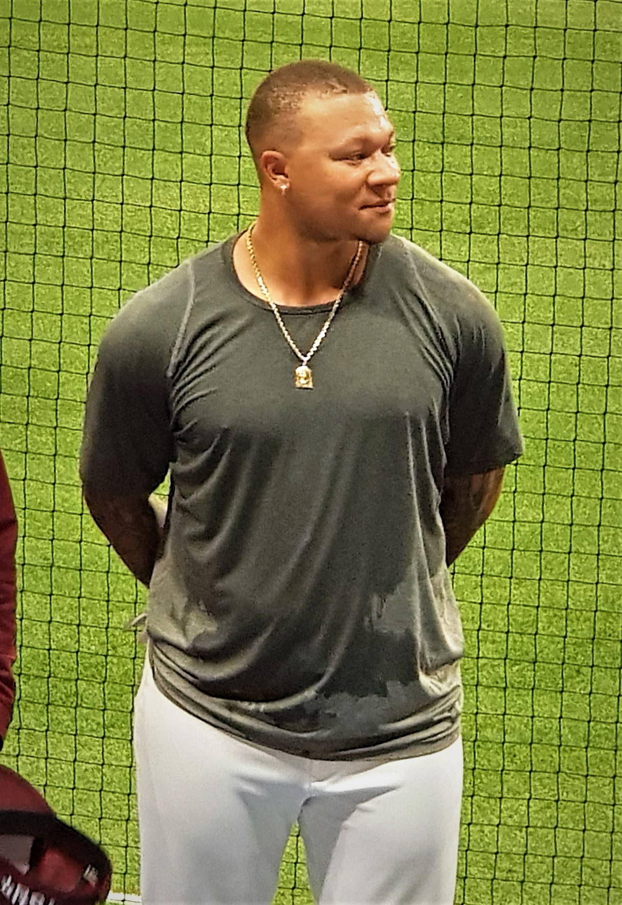 넥센 히어로즈의 마이클 초이스 선수 (2018년 5월 16일 수훈선수 인터뷰)